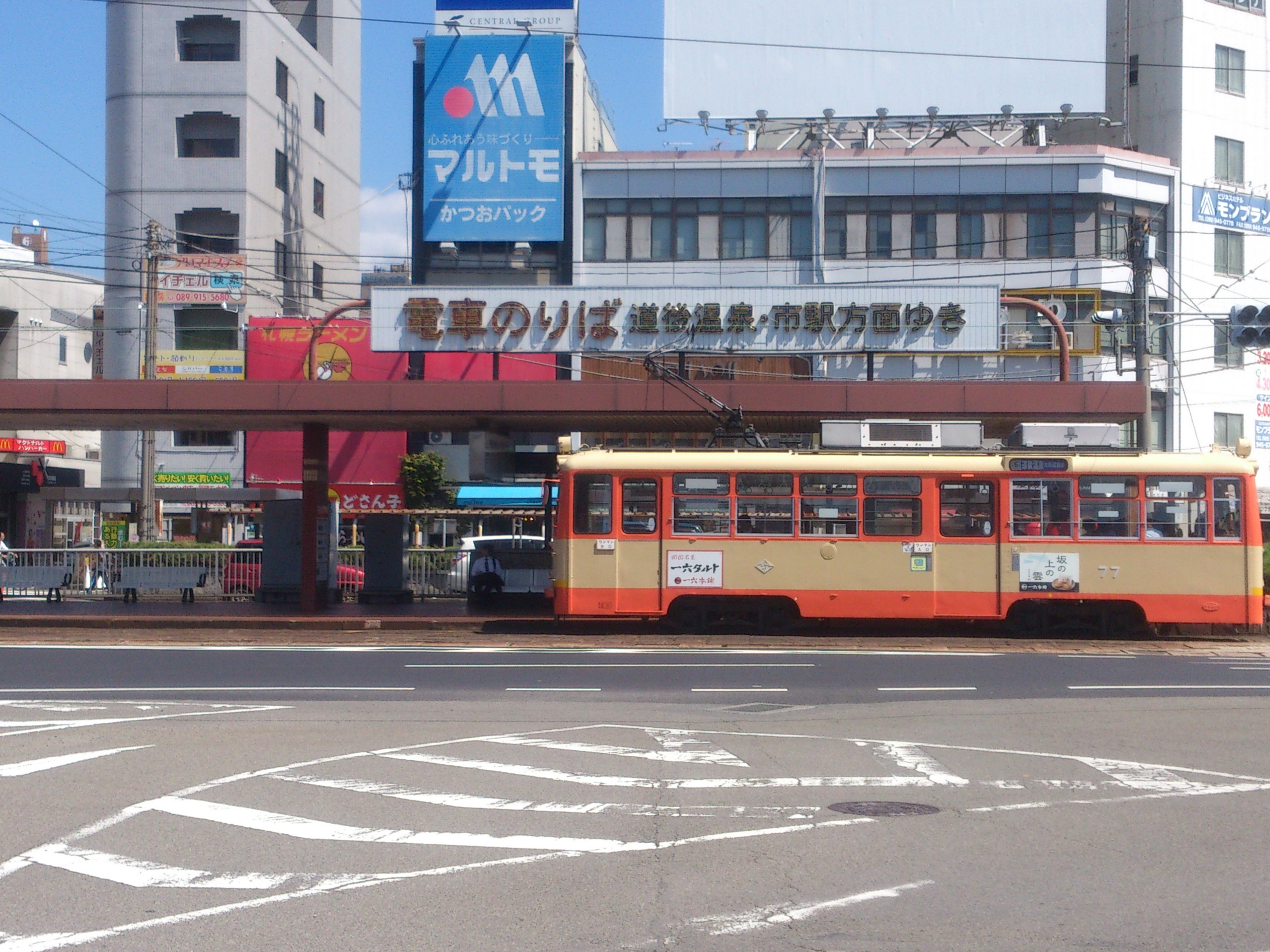 伊予鉄道 JR松山駅前の市内電車ホーム